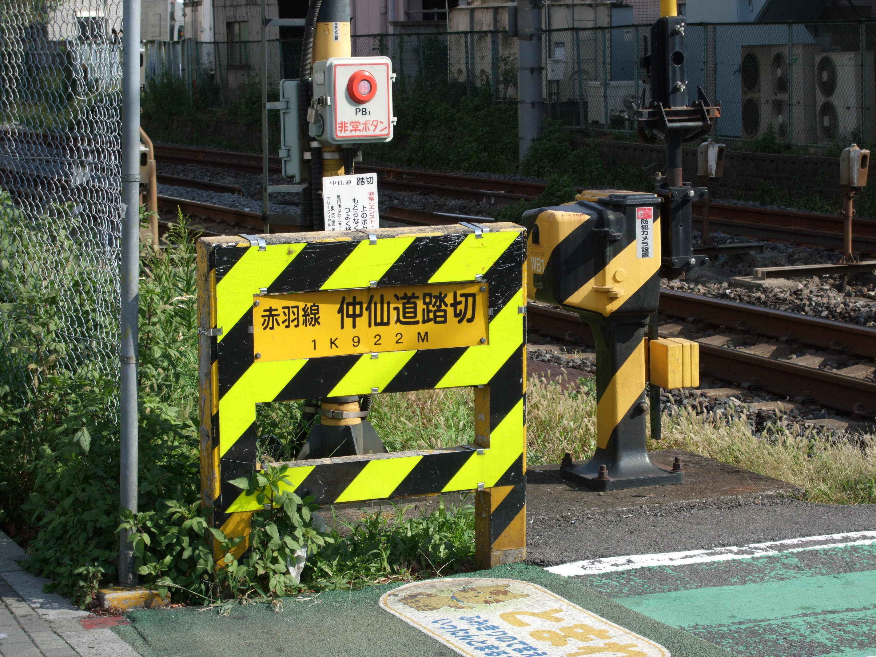 JR赤羽線板橋駅前 仲仙道踏切の銘板